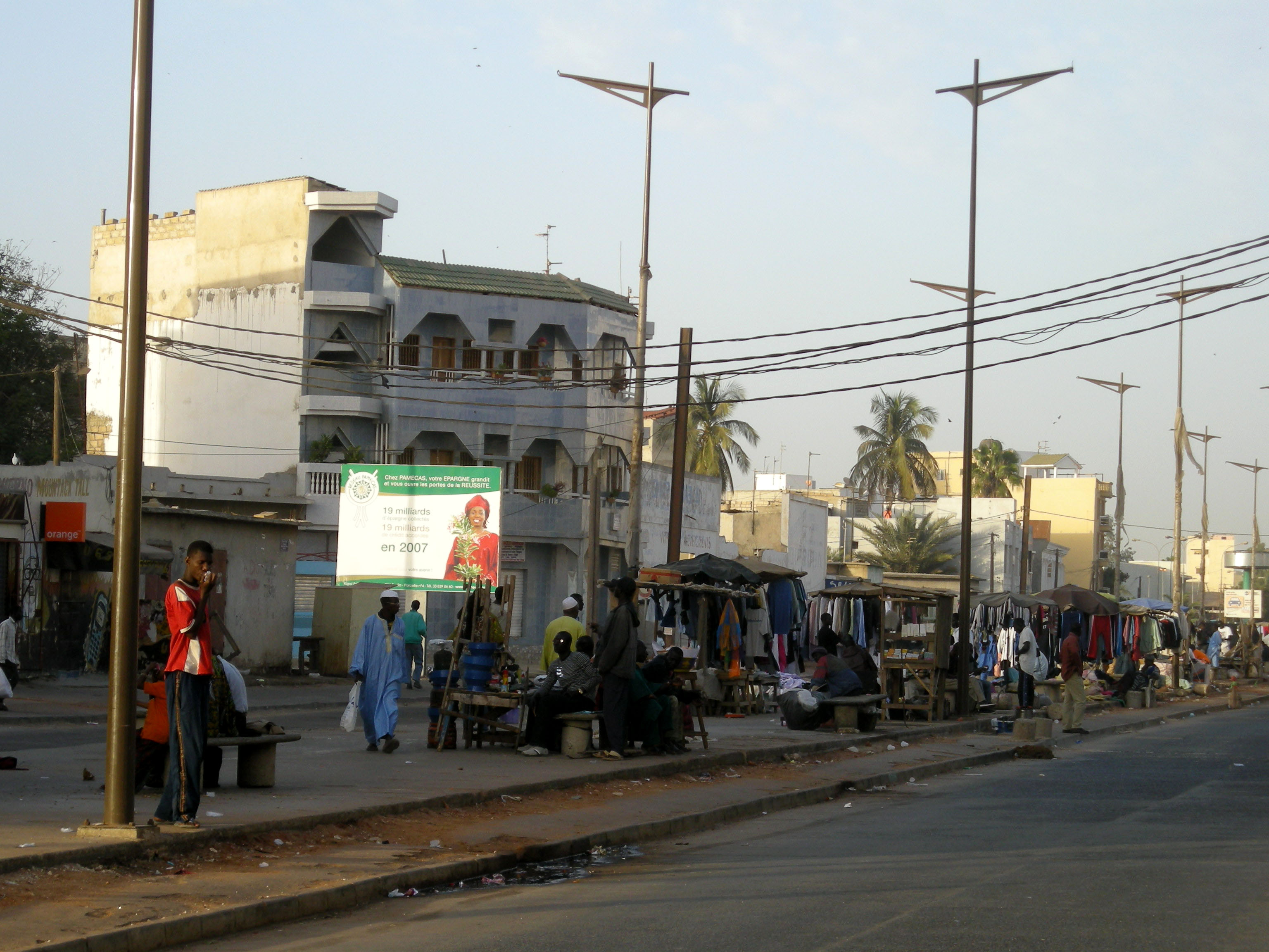 Une artère du quartier Gueule Tapée à Dakar (Sénégal)